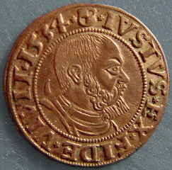 Albrecht von Brandenburg Preußen Groschen, 1534 Vorderseite: Albrecht, IVSTVS.EX.FIDE.VIVIT.1534 Rückseite: Adler, ALBER.D.G.MAR.BRAN.DVX.PRVSS